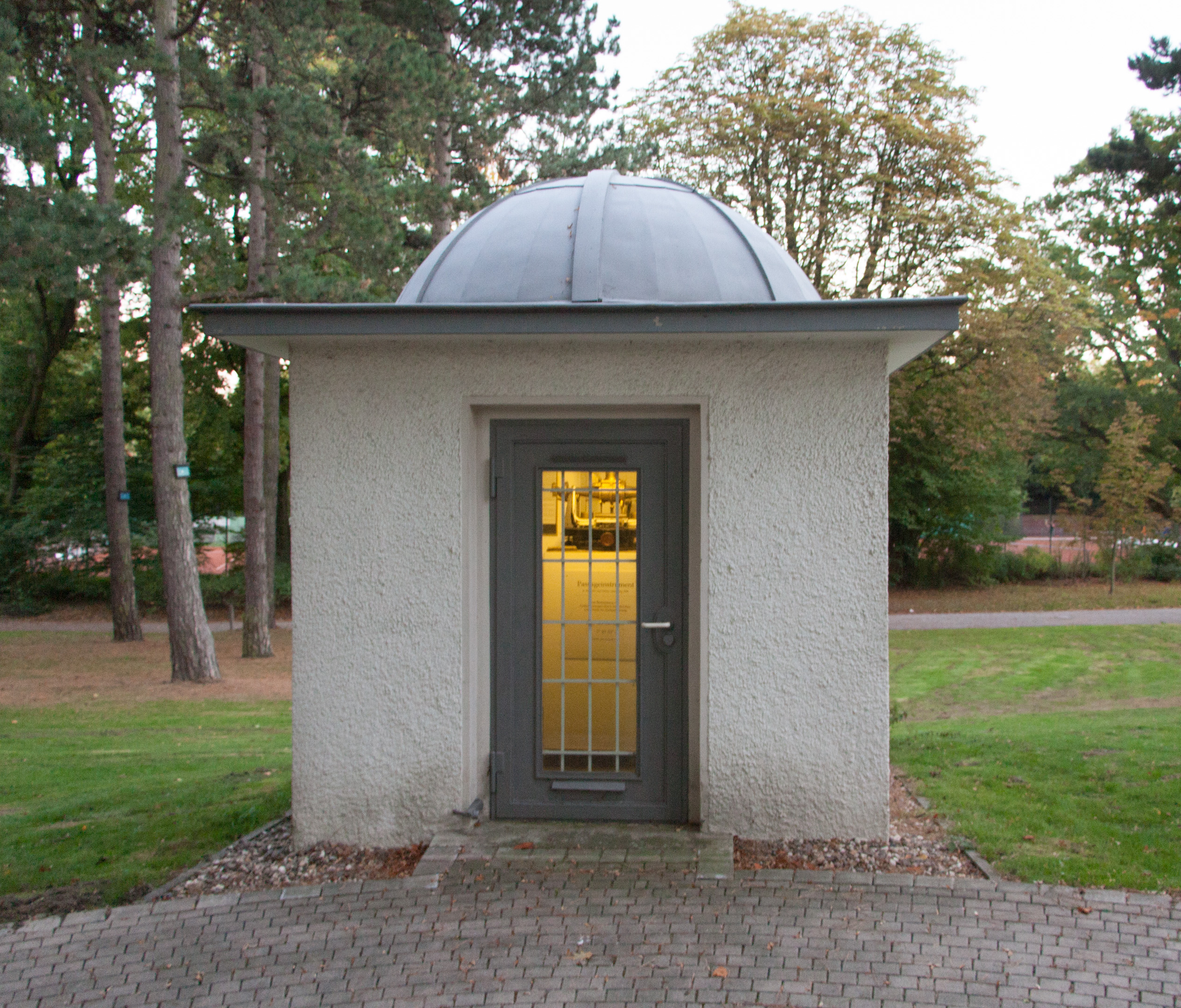 Recklinghausen Monument 179 Volkssternwarte, MeridianhausThis is a photograph of an architectural monument., no. 179